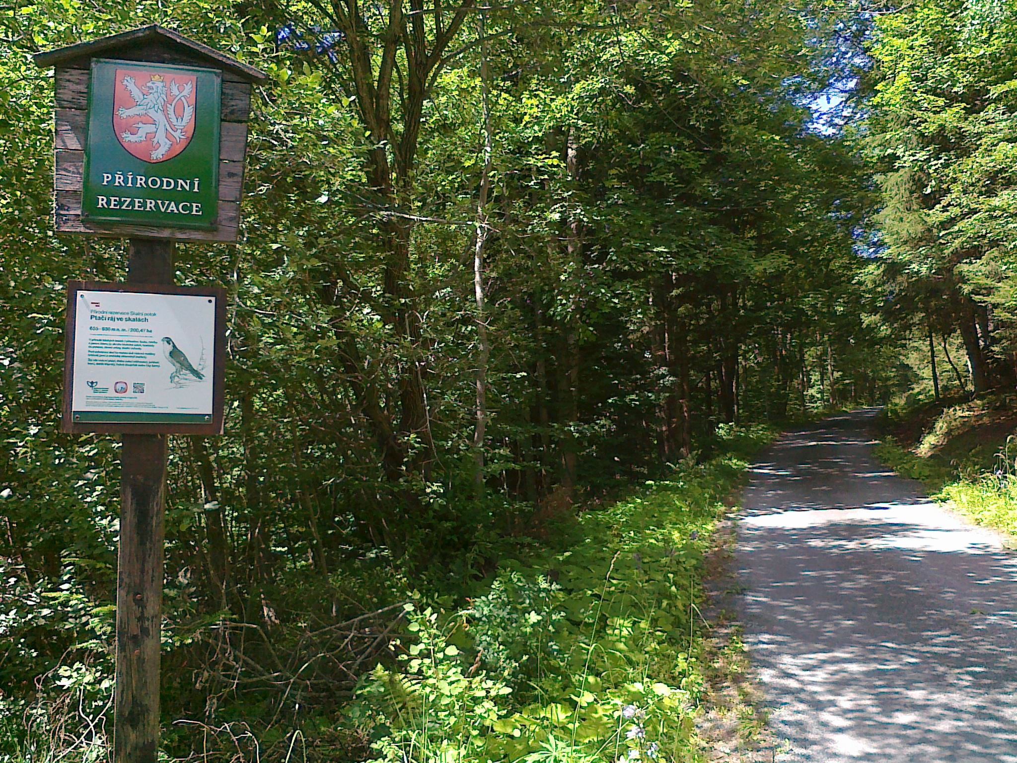 Wejście z drogi nr 451 do rezerwatu przyrody Skalní potok